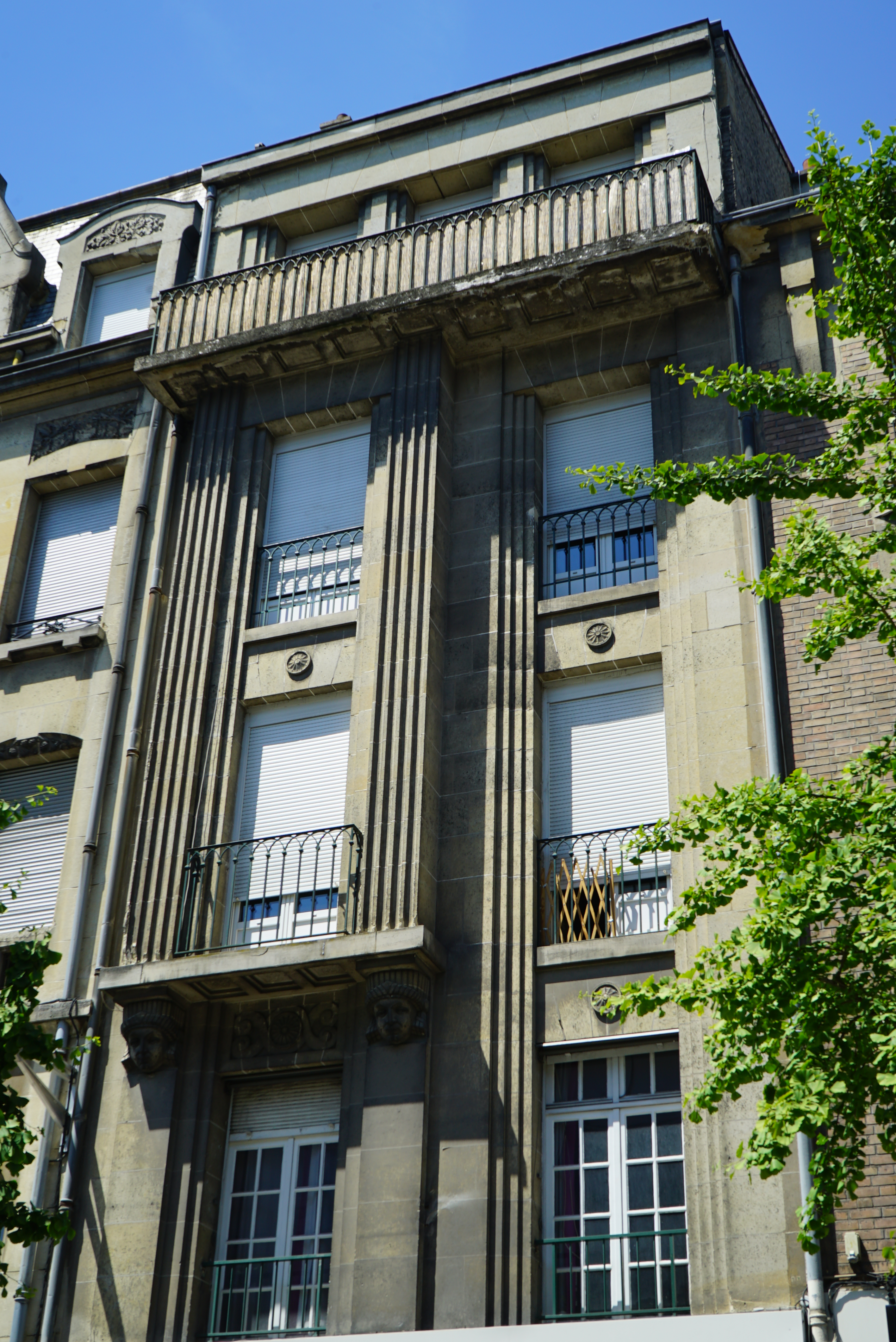 vue de l'immeuble. architecte Trouvat 1925